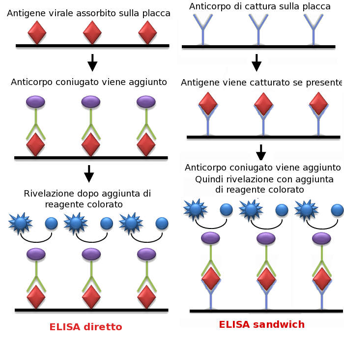 Diagramma di ELISA diretto e sandwich